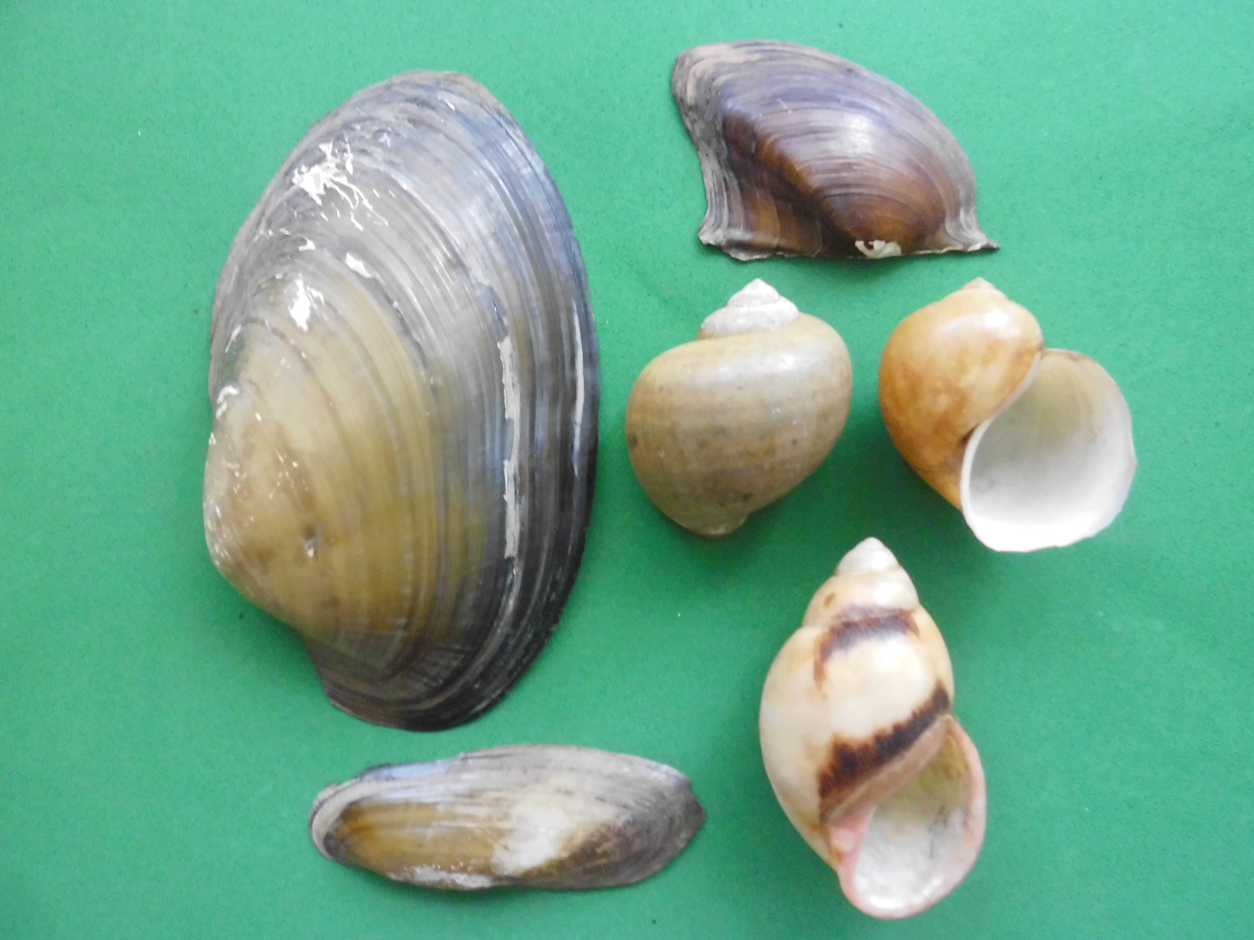 Moluscos no marinos de Venezuela se observan en la imagen las siguientes especies: Bivalvos: Anodontites trapesalis Lamarck, 1819 Paxyodon syrmatophorus Meuscjhen, 1781 Mycetopoda pittieri Marshall, 1919 Gastropoda Pomacea doliodes (Reeve, 1856) Megalobulimus oblongus (Müller, 1774)